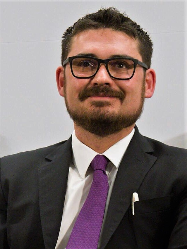 El titular de SEDATU durante su participación en una sesión plenaria con el Grupo Parlamentario de MORENA en la Cámara de Diputados.